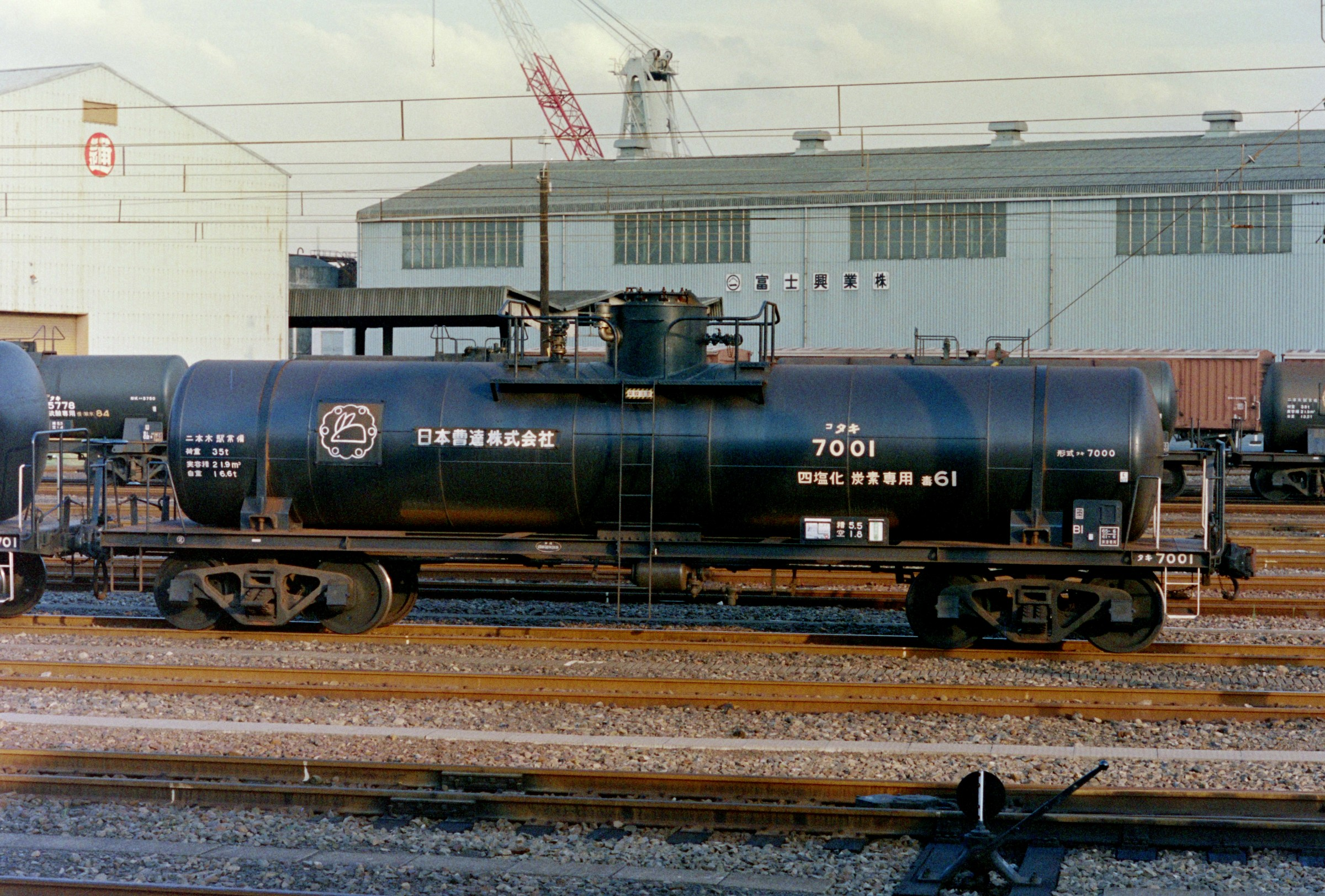 タキ7000形タキ7001。日本曹達所有。安治川口駅にて。